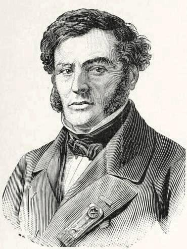 Pierre-Claude-Jean-Baptiste Bravard-Veyrières